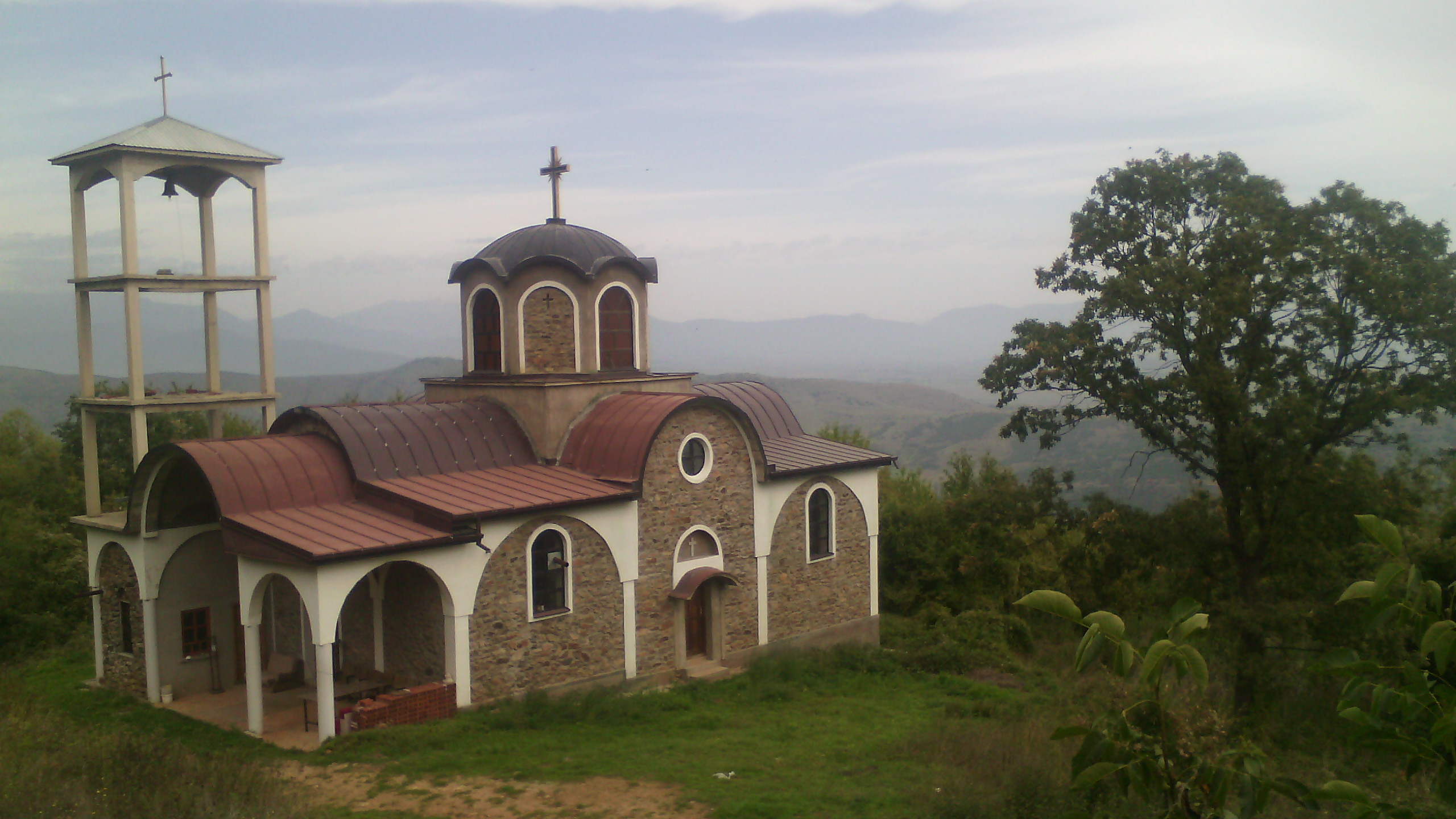 Црквата „Св. Василиј“ во Трстеник